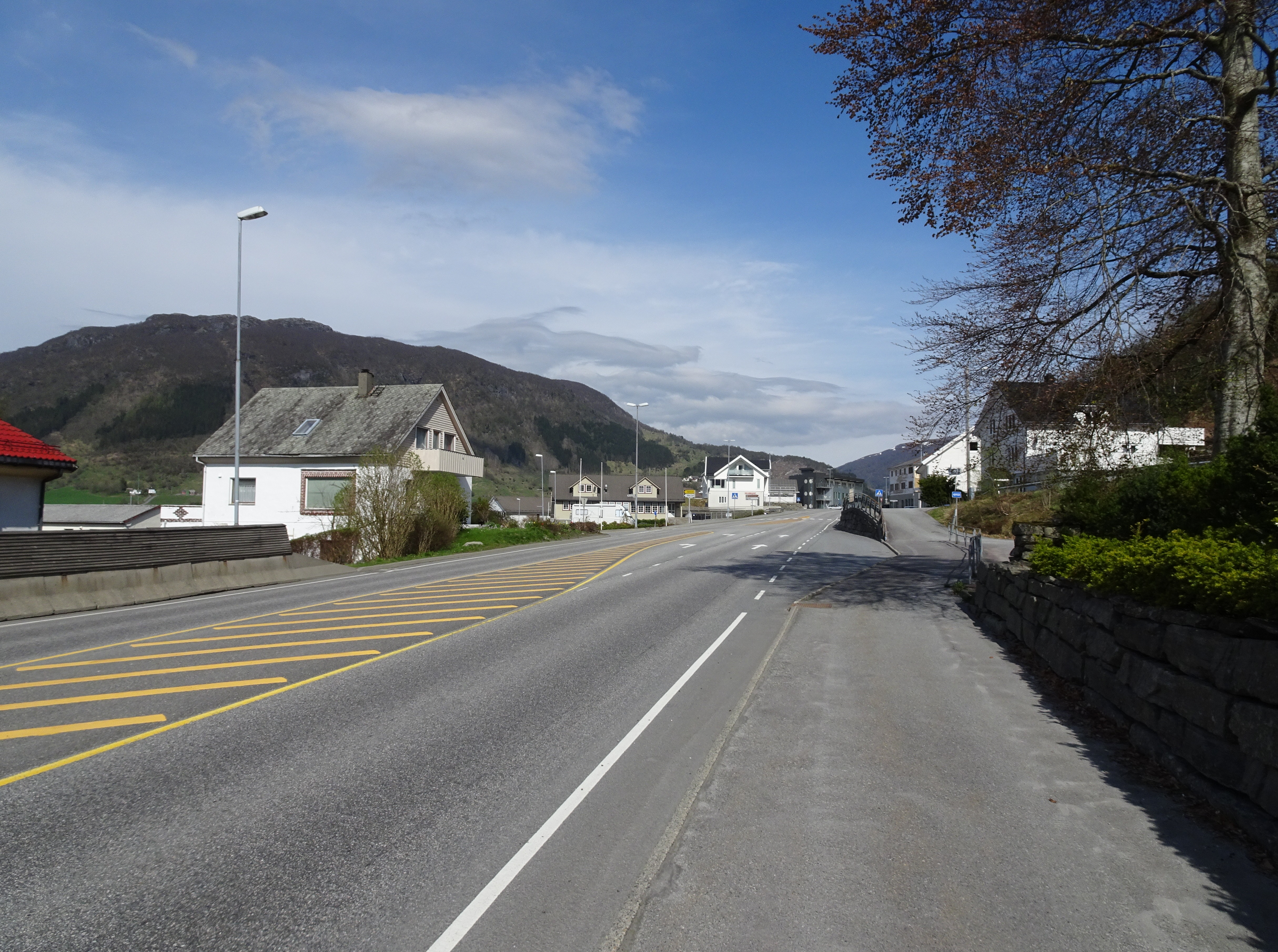 E134 gjennom Ølen